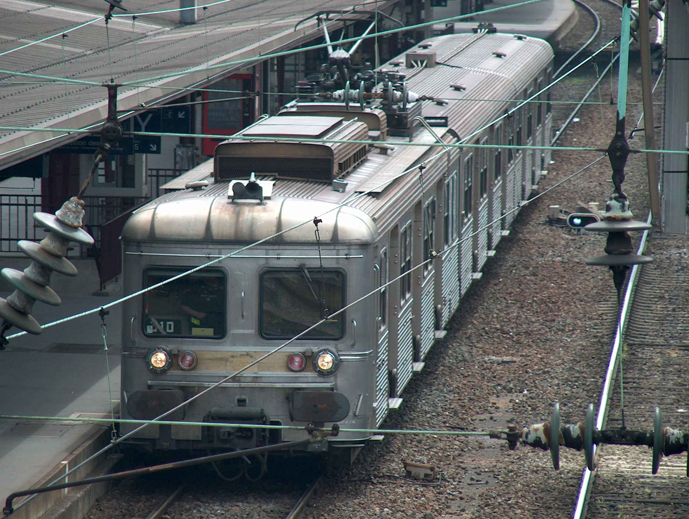 Un élément Z 6300 en gare de Nancy.